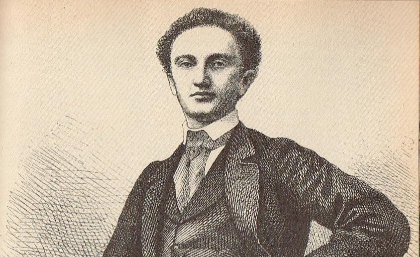 לסל ב-1863